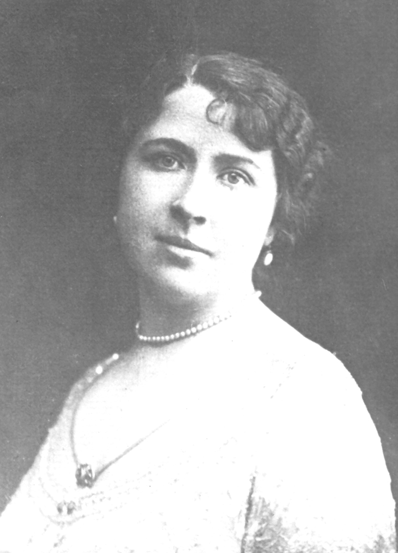 Певица М. М. Скибицкая